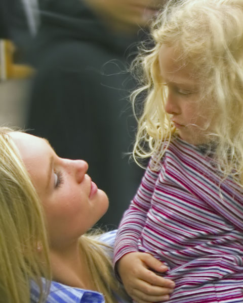 Discussion